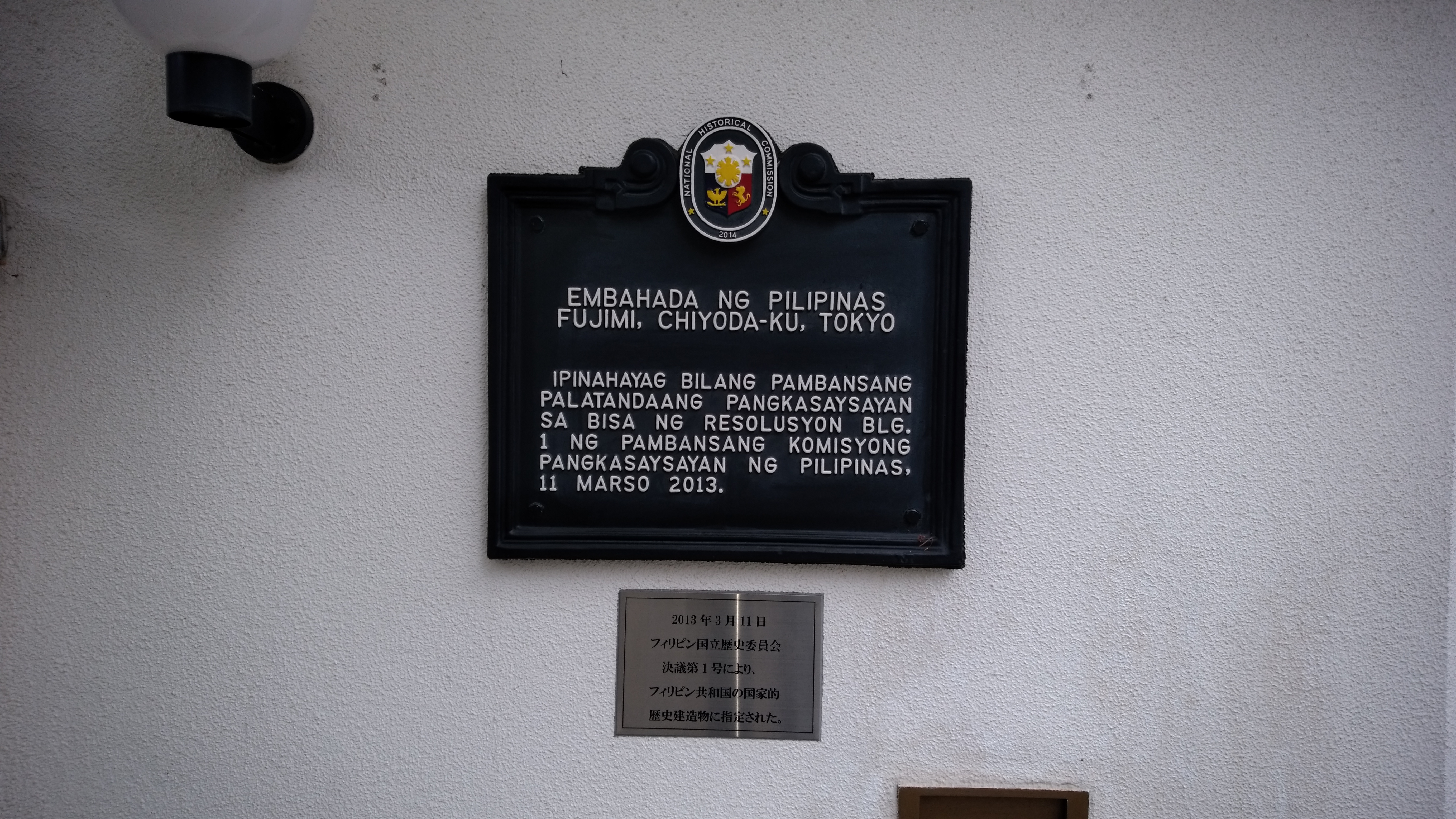 フィリピン大使館公邸の国家的歴史建造物の銘板